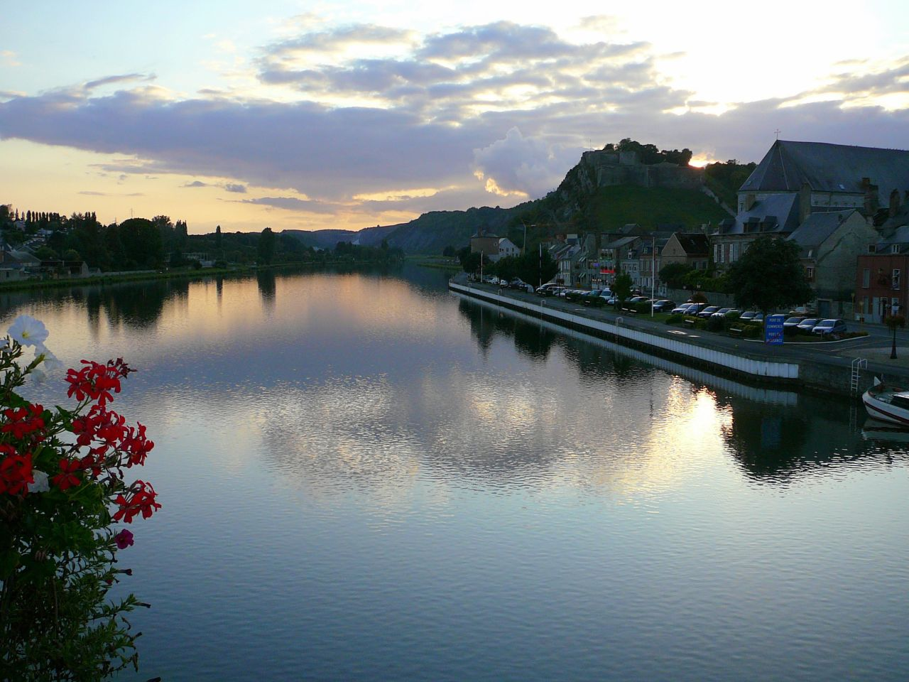 La Meuse dans les Ardennes françaises (Givet, 08)